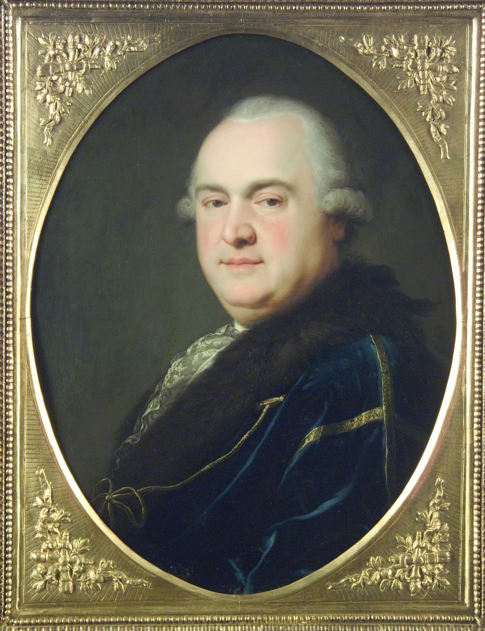 Grassalkovich Antal birodalmi herceg, Bodrog és Zólyom vármegye főispánja.